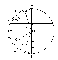 Sfääri pindala valemi tuletamine